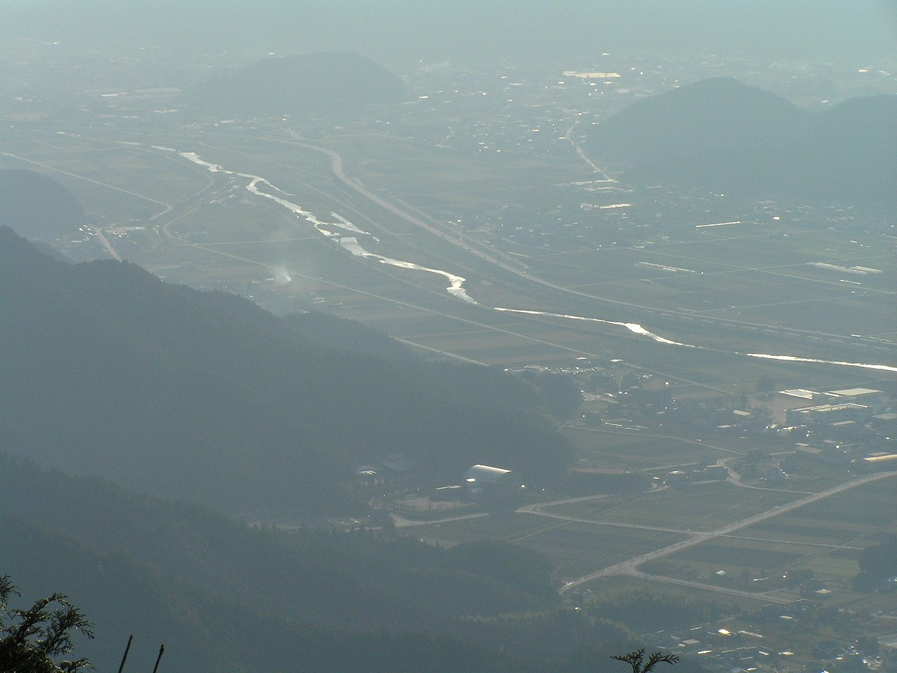 丹波市（五台山より俯瞰）加古川、甲賀山